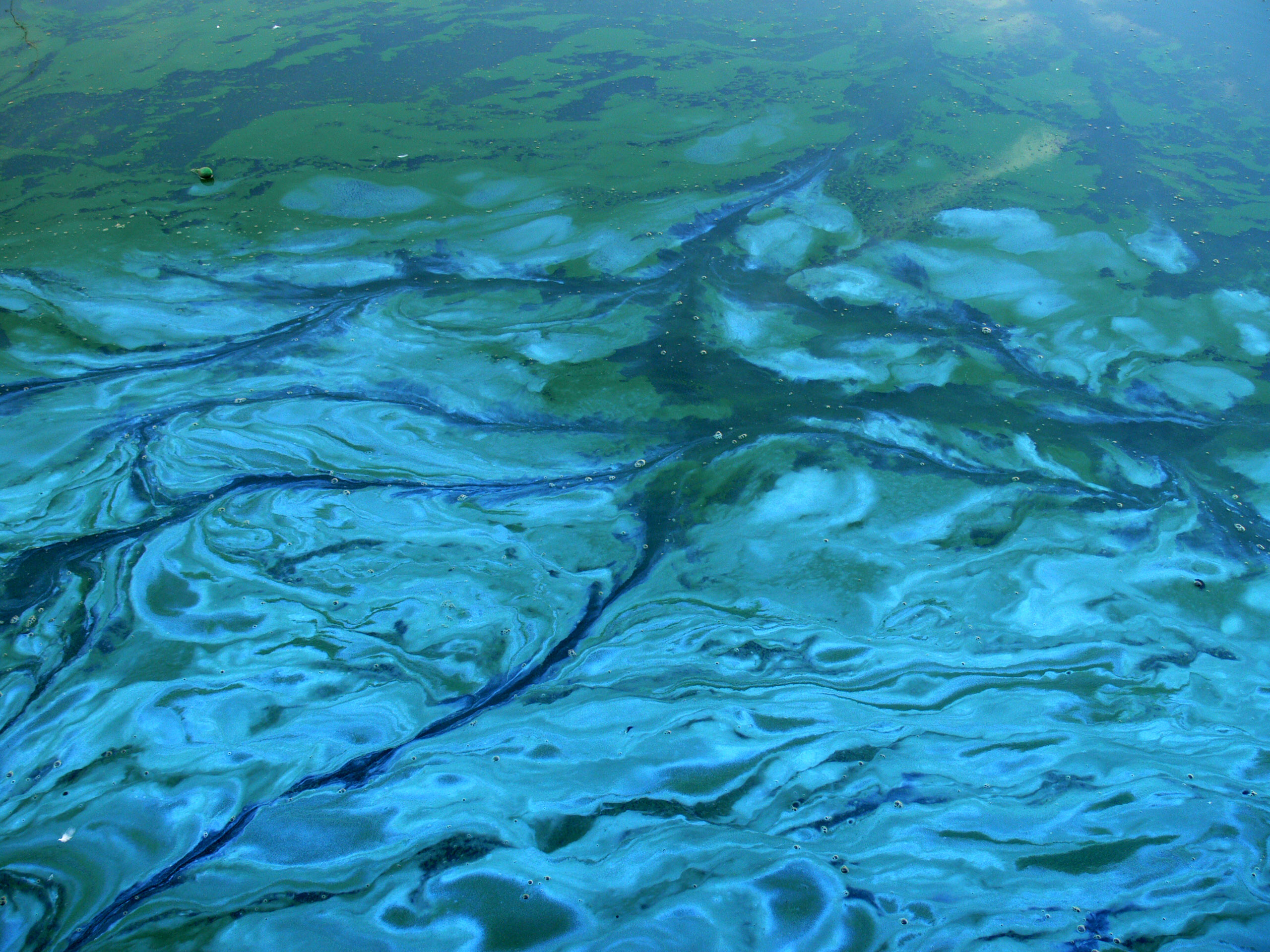 Inflorescence planctonique. Ce sont a priori des cyanophycées (algue bleue). Dans ce cas, quelques heures (ici une quinzaine d'heure) après le début de l'épisode, les taches bleues se sont étendues. Les traces en forme de trainées sont des traces laissées par des poissons et des canards qui circulent sur l'eau, "cassant" le biofilm. La couleur bleue caractérise des zones d'accumulation de pigments bleus libérés par des bacéries mortes. Ici l'eau a une consistance de «soupe» sur les 5 à 10 mm, sous la surface. Lieu : quai du Vault à Lille, non loin du centre ville (France), après une longue période pluvieuse (non caniculaire, et même sous les moyennes saisonnières, mais avec des nuits inhabituellement douces). Le canal proche (Deûle) est également couvert d’une couche de plancton vert sur de vastes surfaces (centaines de mètres carrés), mais beaucoup moins épaisse. Les échantillons dégagent une forte odeur d'algue (type spiruline).